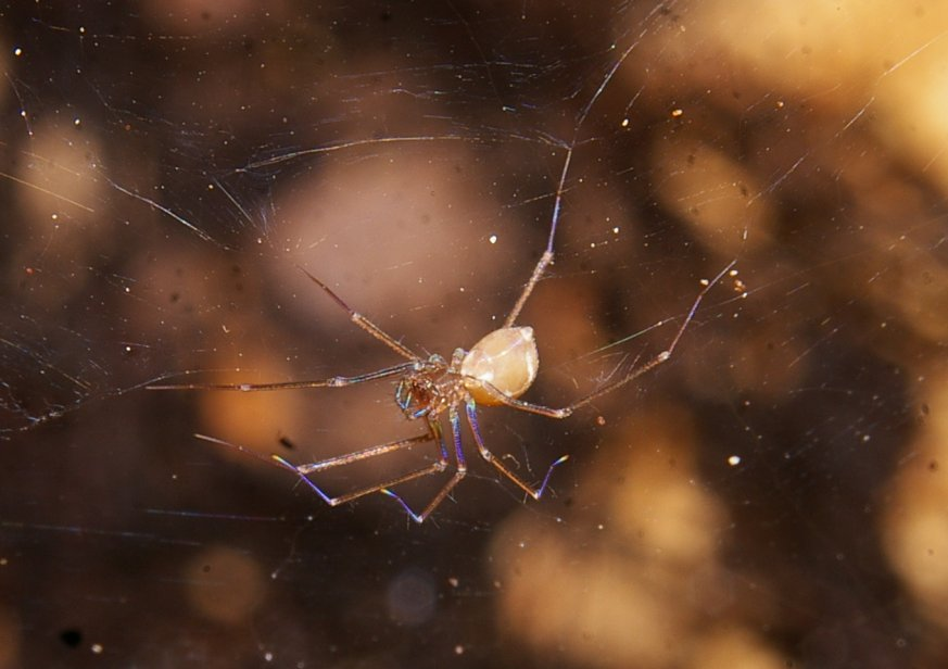 Leptoneta infuscata, femelle, sur sa toile